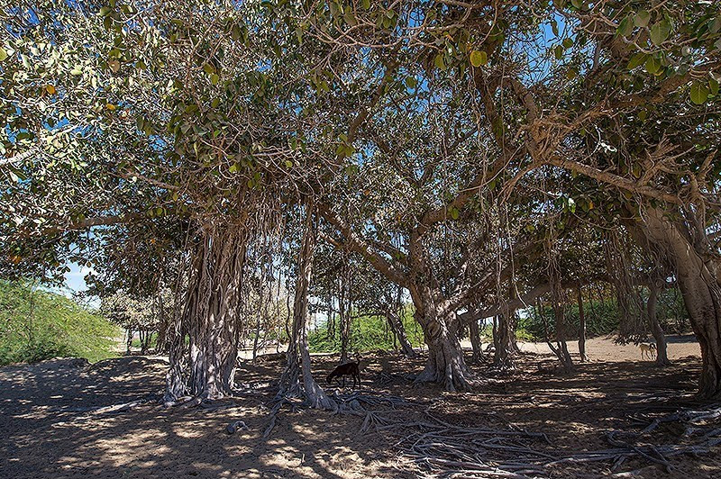 بندر تنگ سیستان و بلوچستان بندر تنگ بخش کوچکی است در شهر چابهار که به دلیل تلاقی کویر و دریا در این منطقه جذابیت های ویژه ای به وجود آمده که جلوه ی بی نظیری را به این روستا بخشیده است. شهرستان کنارک که در جنوب شرقی ایران و در سواحل زیبای دریای عمان قرار گرفته است، از دیرباز با اسکله صیادی بزرگ و فعالش یاد می‌شود. جاذبه های طبیعی بکر و بی نظیری در این بخش کوچک بندری وجود دارد دل هر گردشگری را می برد.سواحل شنی و ماسه ای و صخره ای وجود درخت انجیر معابد و تپه های گل افشان از جاذبه های این بندر بی نظیر است.